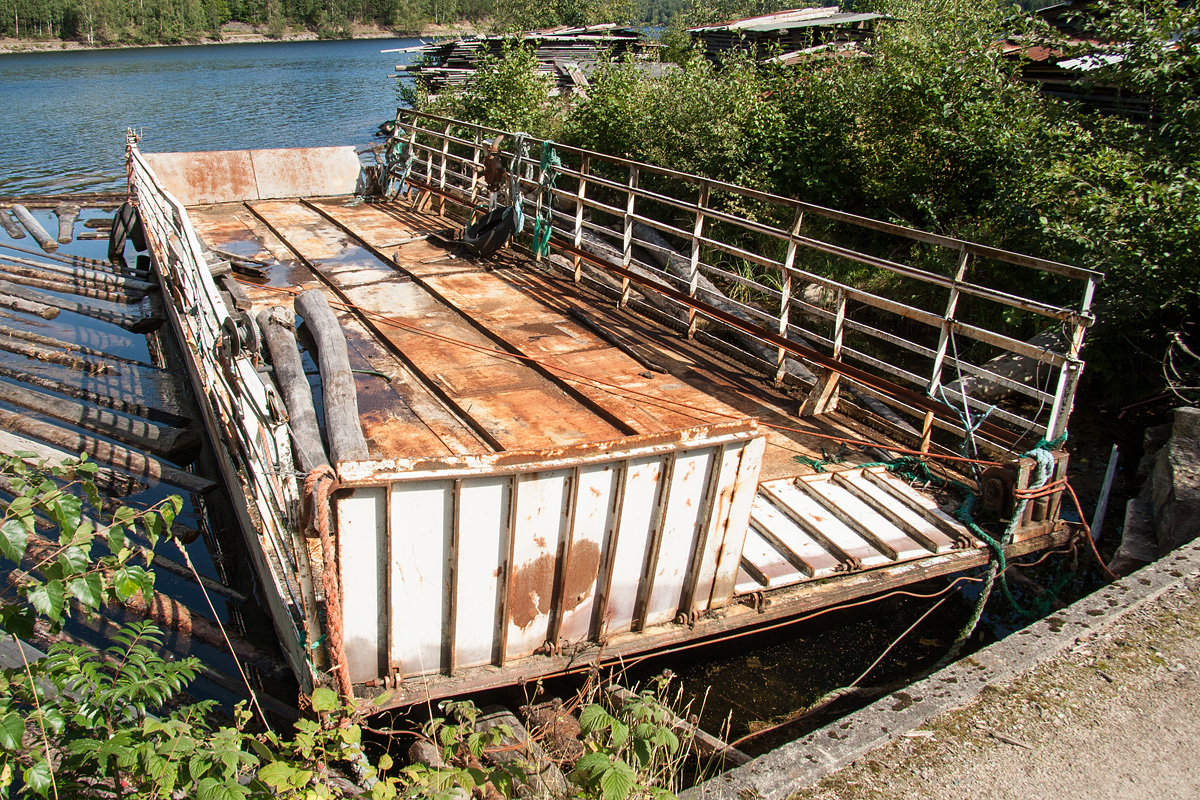 Den tidligere Fjågesundferga i opplag. Opprinnelig ferge i Haugsjåsund, senere i bruk på Fjoneferga fram til 1976. Brukt som ferge i Fjågesund fra 1987 og fram til Fjågesund bru ble åpnet i 1997.